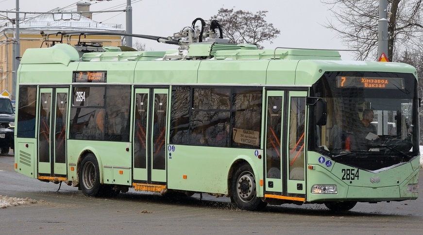 тралейбус